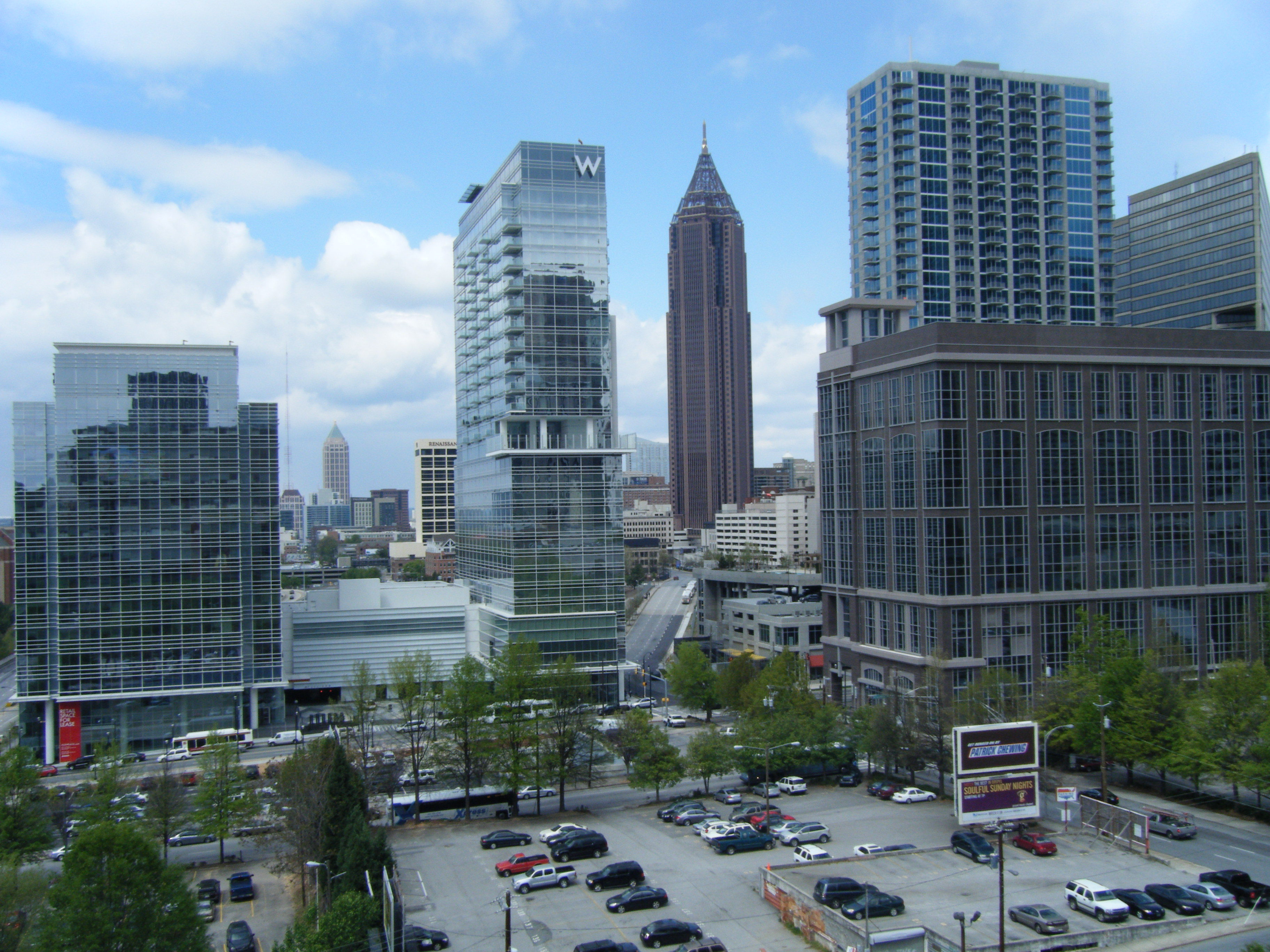 Allen Plaza in Atlanta.